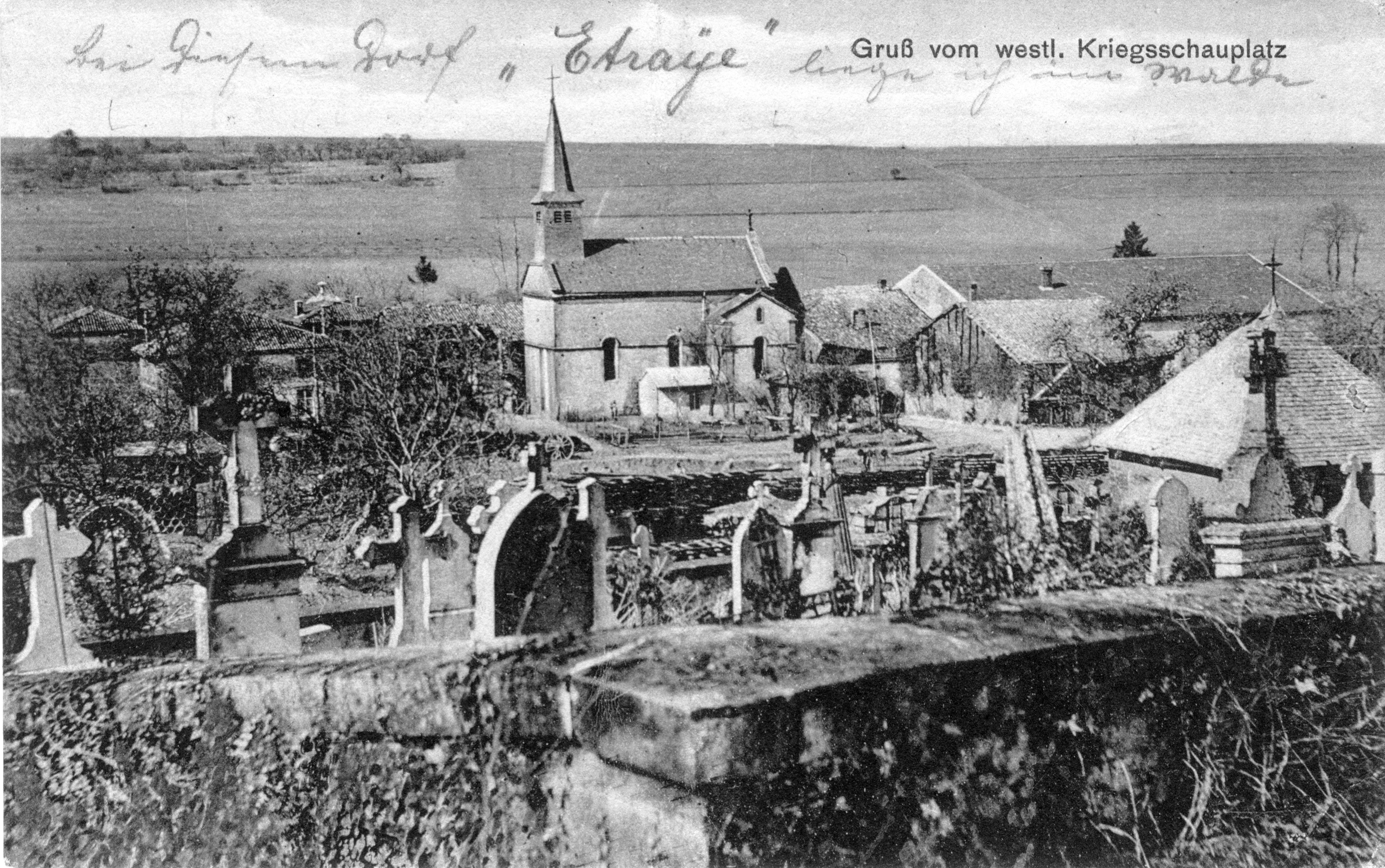 Etraye. L'église vue depuis le cimetière. Carte postale allemande.